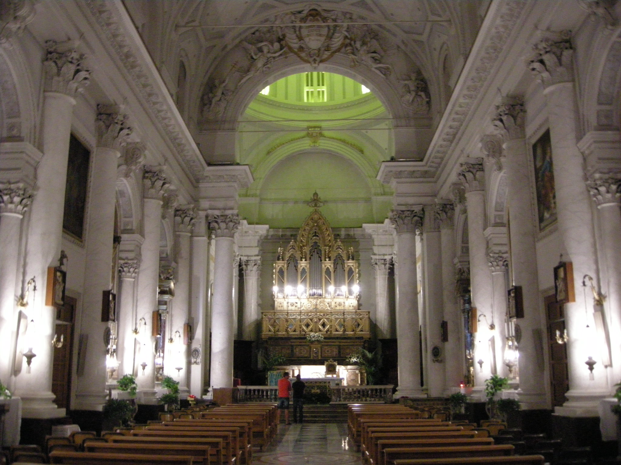 Acireale, basilica dei santi pietro e paolo, interno